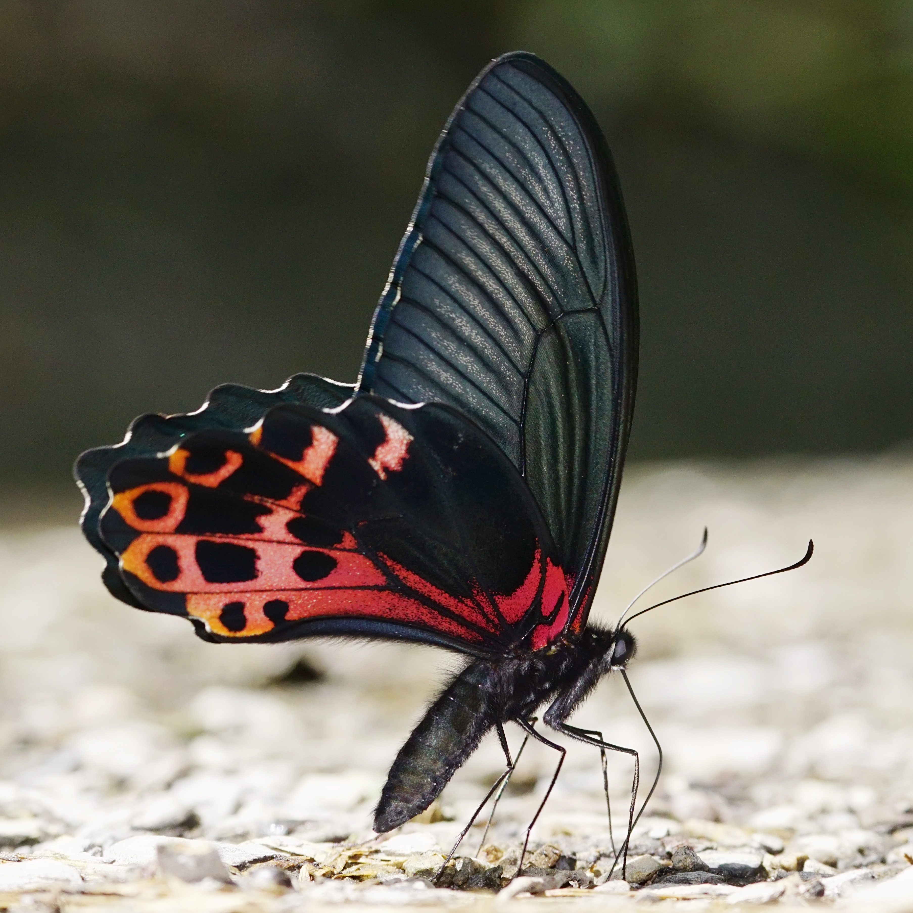 台灣鳳蝶 Papilio thaiwanus